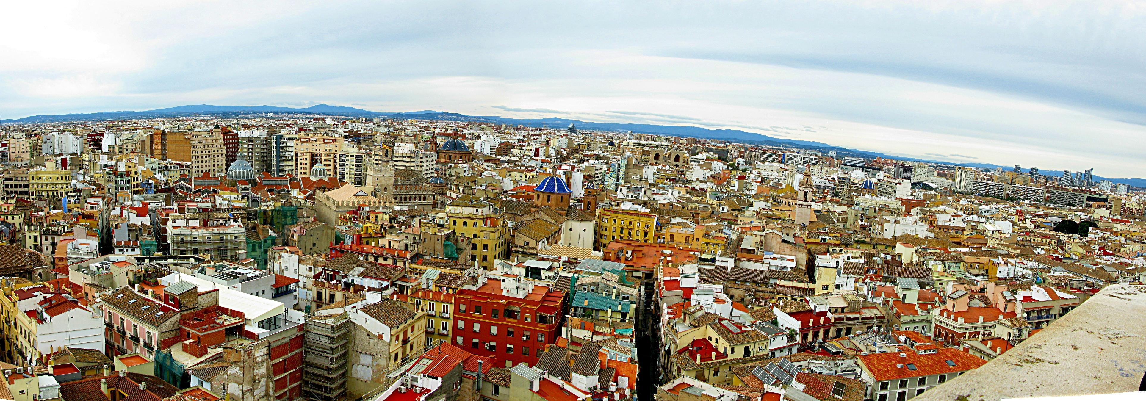 Vista panorámica de la ciudad de Valencia, desde la torre del Micalet.